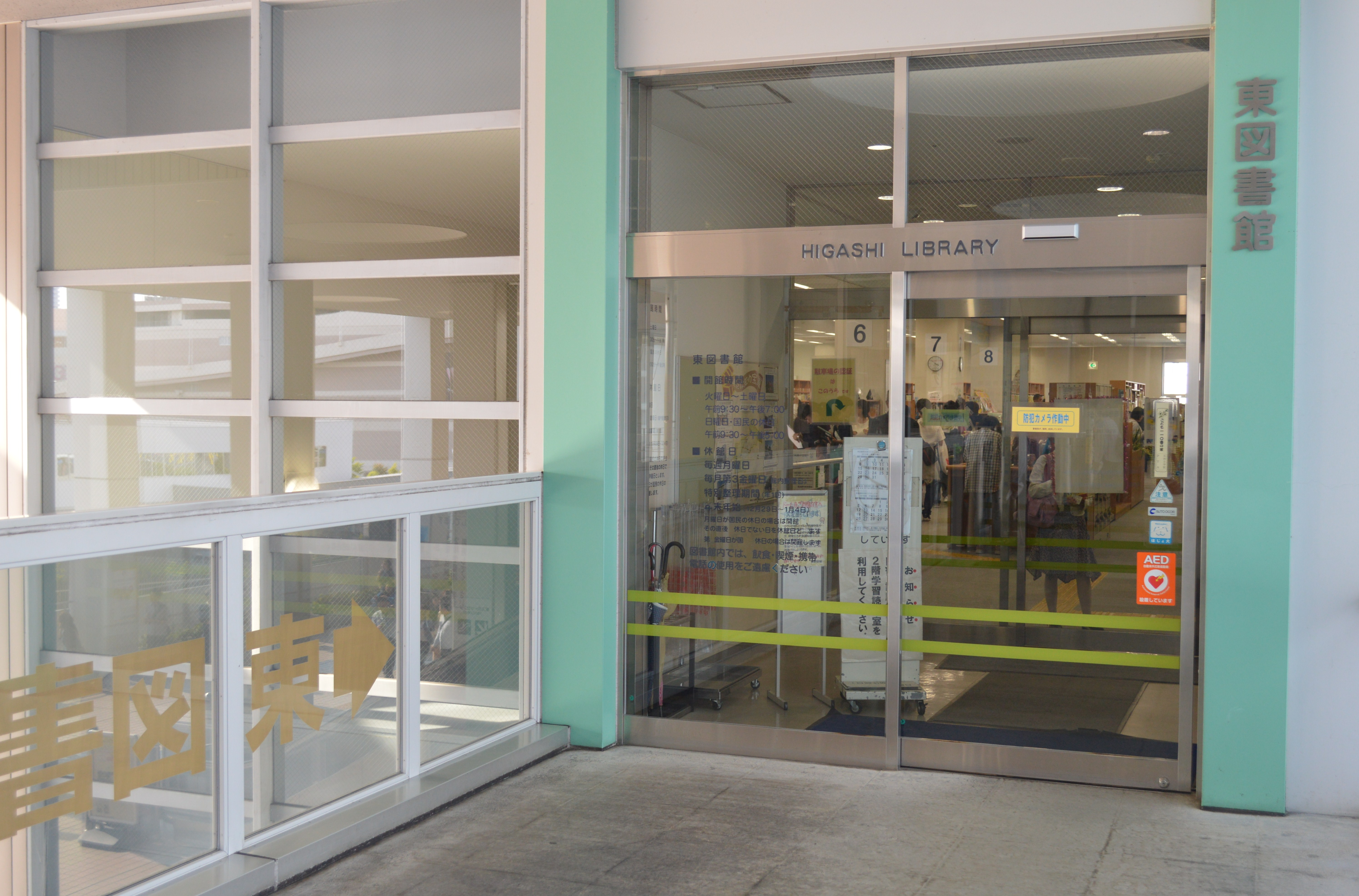 名古屋市東図書館の2階入口。複合施設「カルポート東」にある。